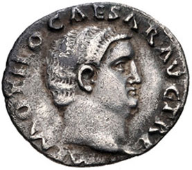 Изображение Отона на монете с сайта